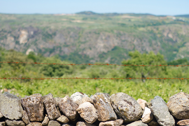 Detalle de una cortina de Mieza, Parque Natural de Arribes del Duero, España.